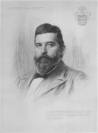 Portrait Ludwig von Graff